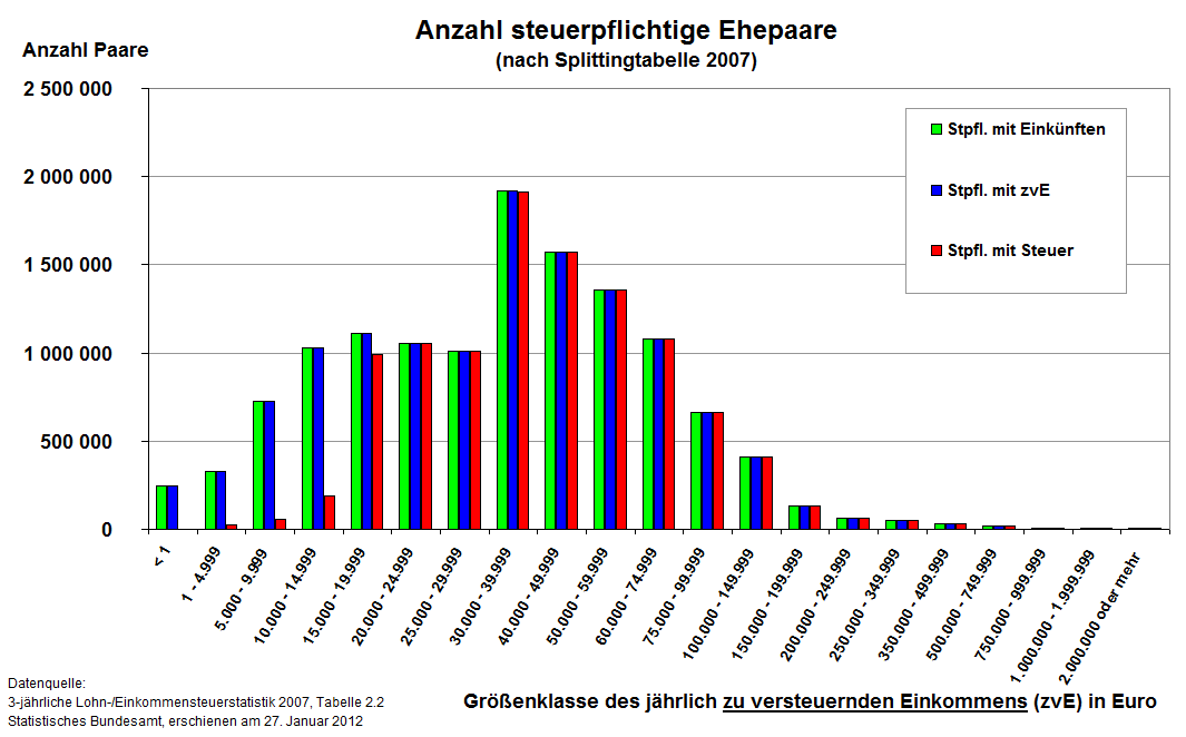 Steuerpflichtige Ehepaare (Splittingtarif) in Deutschland nach Einkommensgruppen (Dreijährliche Lohn- und Einkommensteuerstatistik 2007, Tabelle 2.2, Fachserie 14 Reihe 7.1, erschienen am 27. Januar 2012)